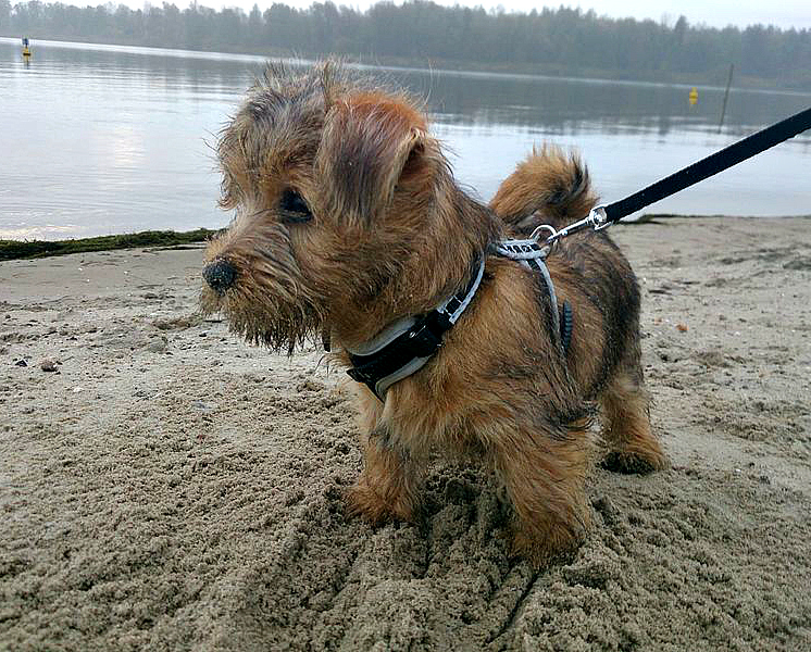 Norfolk terriër, Bruno, 9 weken oud.